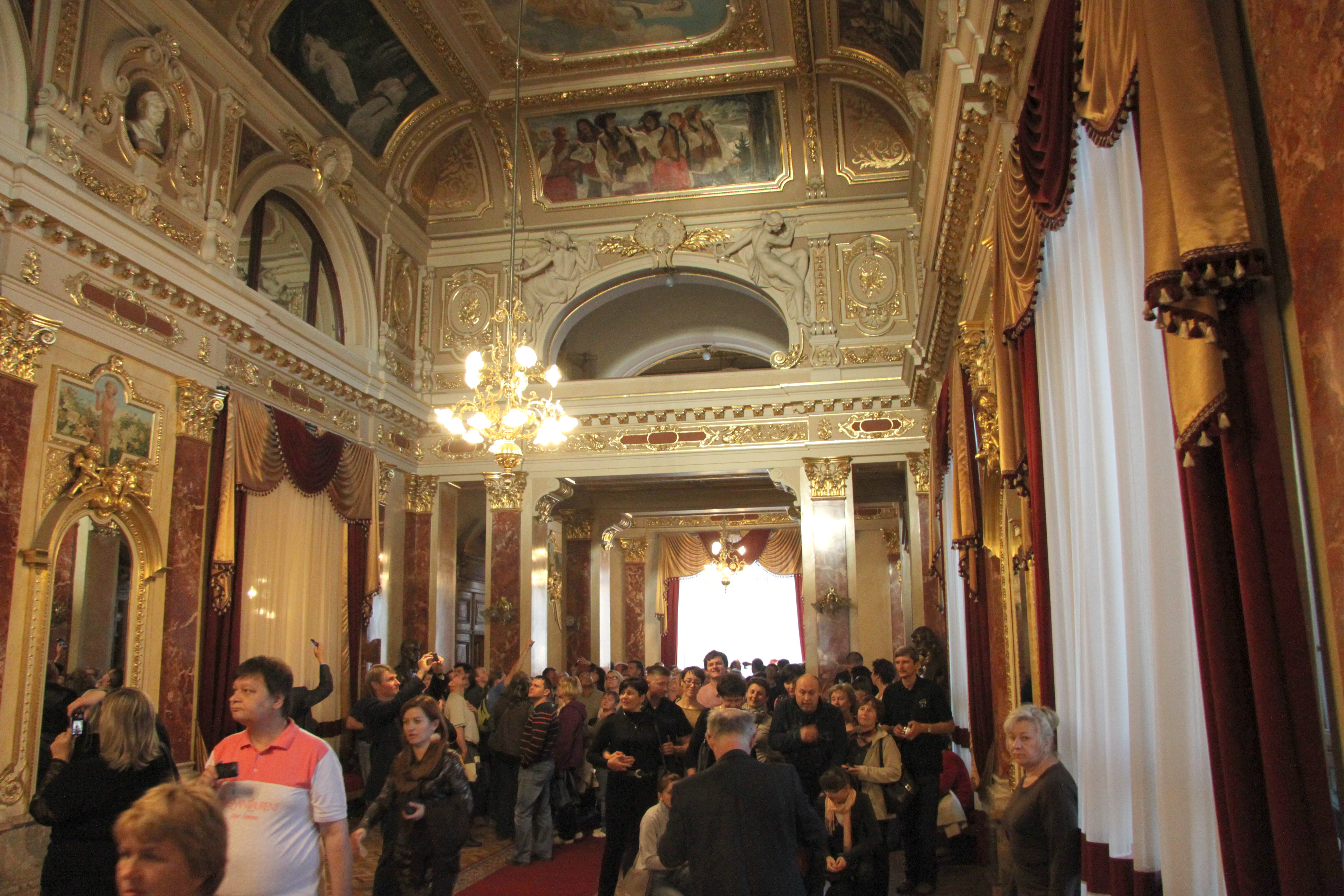 Театр опери та балету, в якому виступали видатні співаки, артисти, композитори світової слави, Львів, Свободи пр., 28